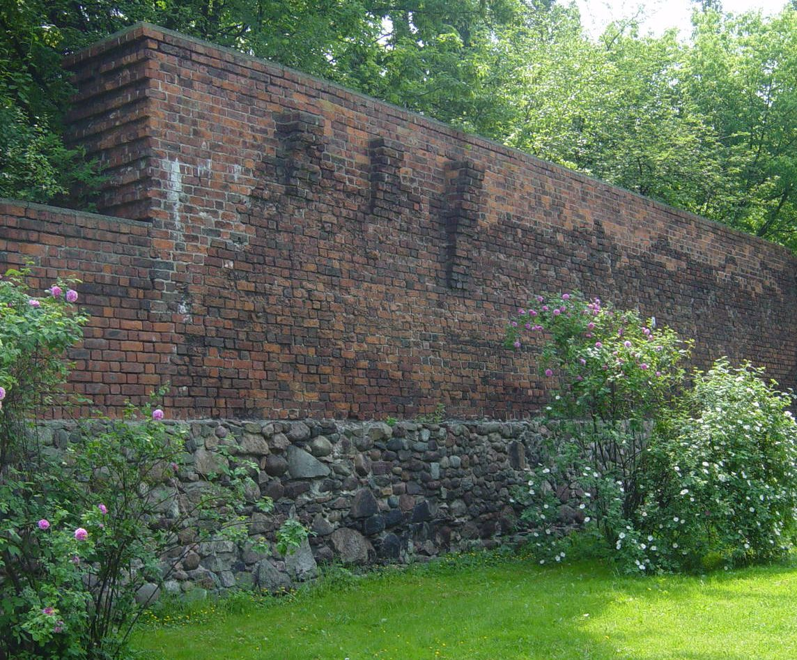 MURY STAREGO KALISZA